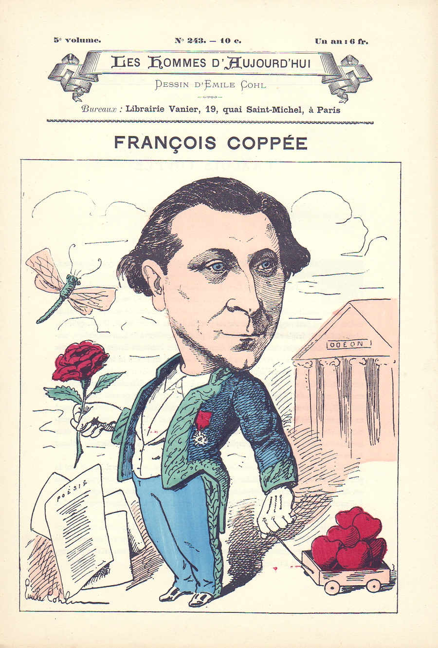 Les Hommes d'aujourd'hui, n°243 (décembre 1885). Caricature de François Coppée par Émile Cohl. Scan exemplaire personnel.